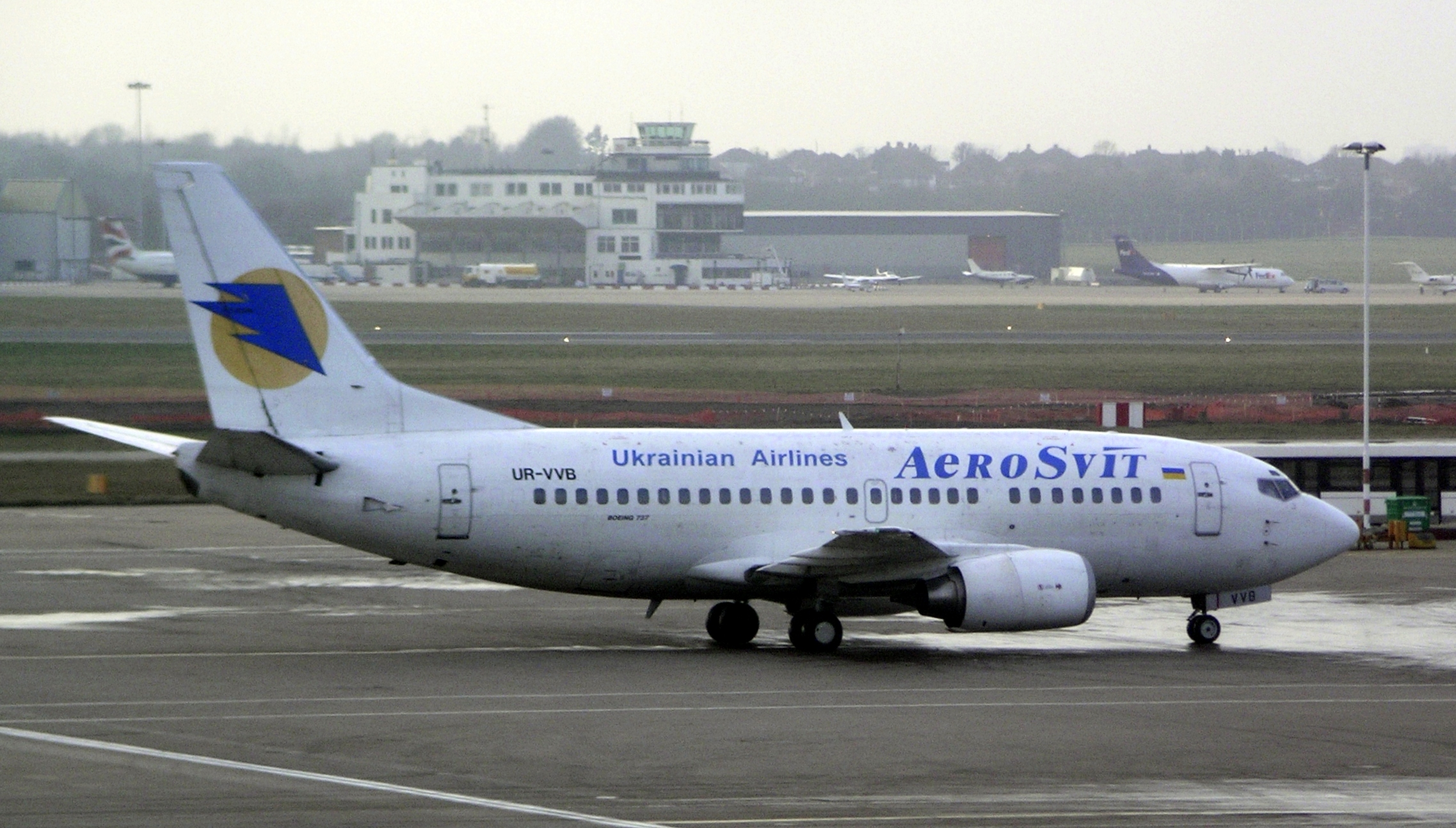 Un UR-VVB Boeing 737 de AeroSvit en el Aeropuerto Internacional de Birmingham Aerosvit UR-VVB @ Birmingham International Airport. January 2006